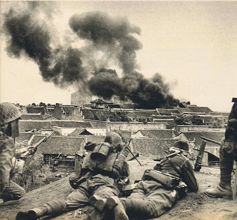 宜昌作戦で湖北省・沙市を掃討中の歩兵第23聯隊・第2大隊。この部隊は池田支隊に属し第13師団と共に東から宜昌方面へと進軍した。 Battle of Zaoyang-Yichang: Soldiers of the 2nd Battalion, 23rd Infantry Regiment, seizing the Shāshì city, 8 June 1940. The battalion was a part of the "Ikeda Detachment", which went westward along with the IJA 13th Division.